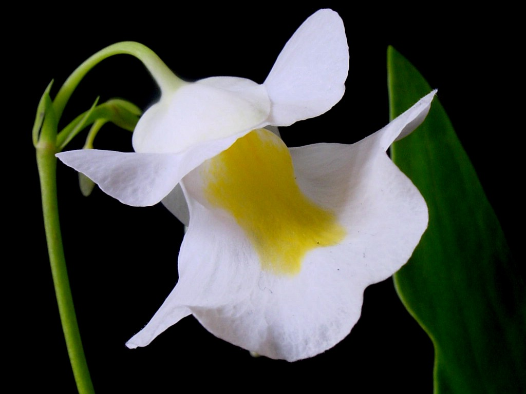 Utricularia alpina flower.